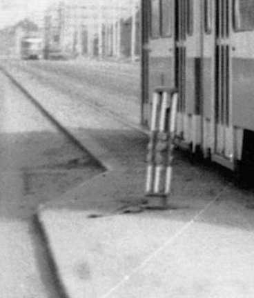 Praha, Hostivař, světelný dopravní majáček a prototyp tramvaje Tatra KT4t č. 0014 v zastávce Na Groši.